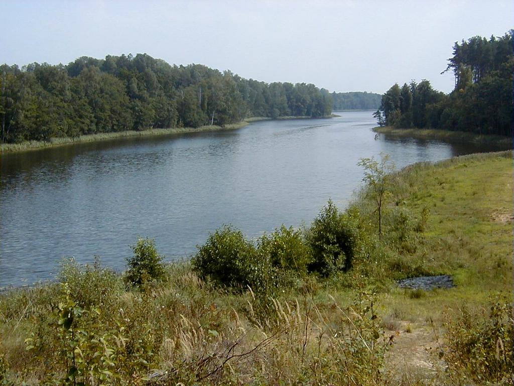 Lielais Gusena ezers pie Robežniekiem 2002-08-11